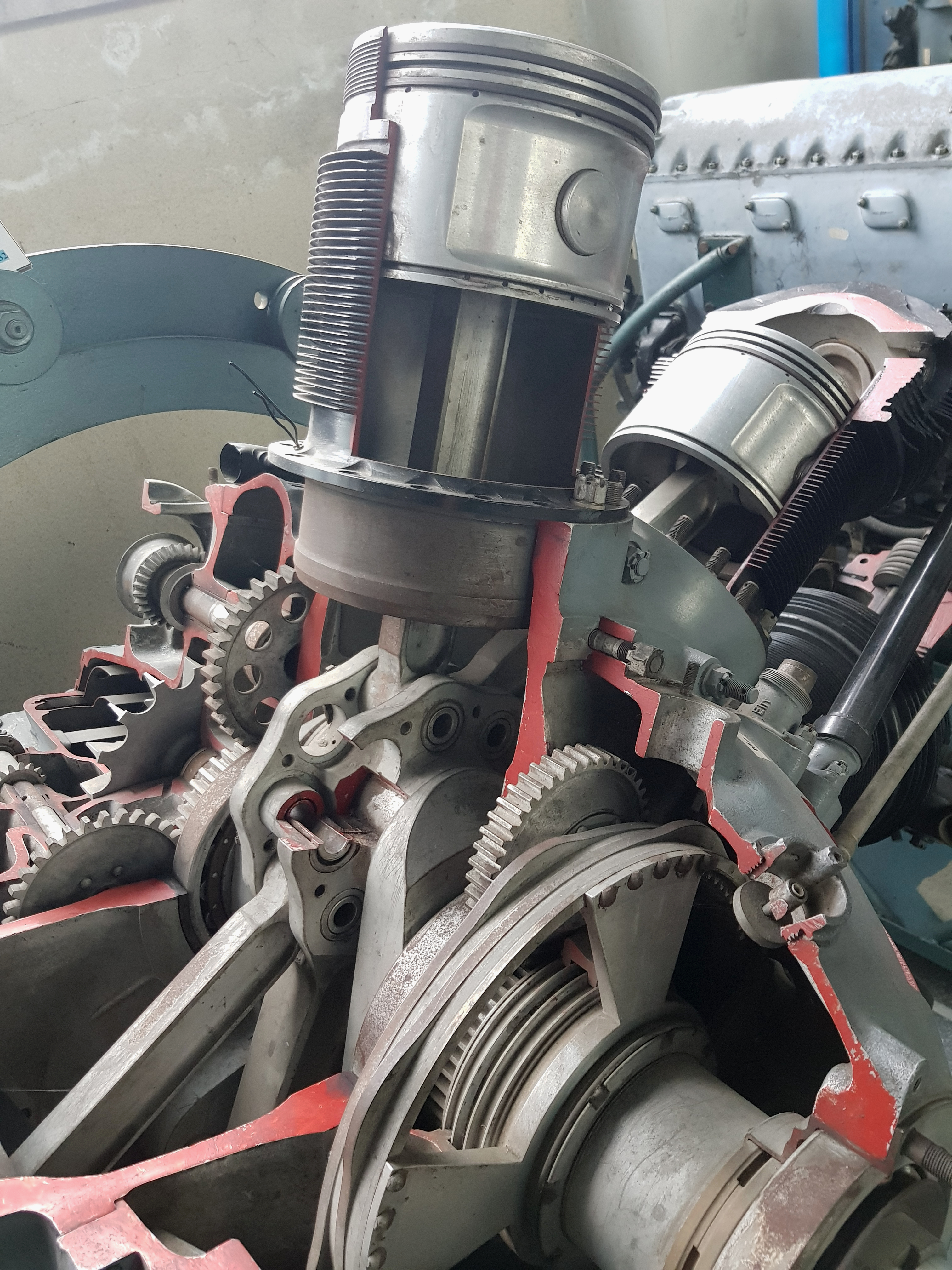 Zylinder des aufgeschnittenen Flugzeugmotors BMW-132 „M15 serie 1356/1320“ im Militärmuseum Bukarest.